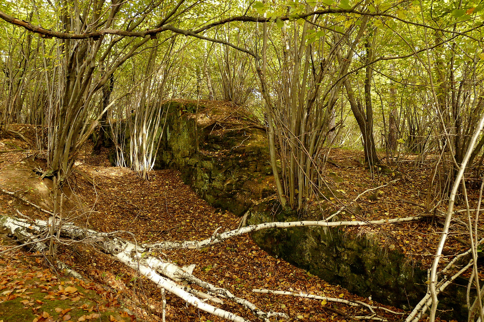 Vytěžená dajka na Hřebínku